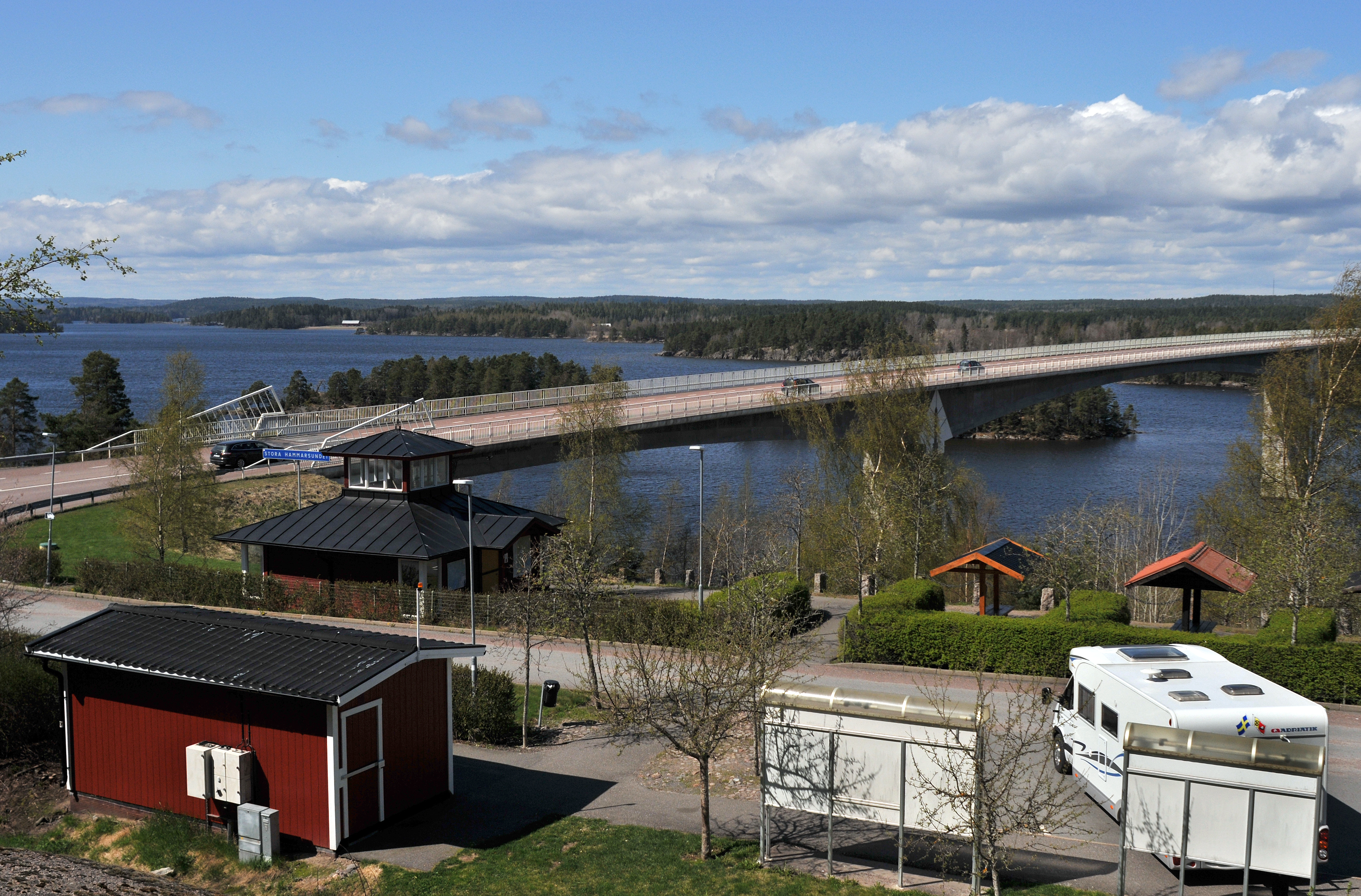 Stora Hammarsundet i nordligaste delen av Vättern i Hammars socken, Askersunds kommun, Närke.